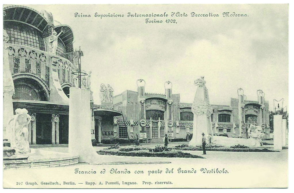 Immagine di una cartolina dell'Esposizione Internazionale d'Arte Decorativa Moderna del 1902 (Torino)